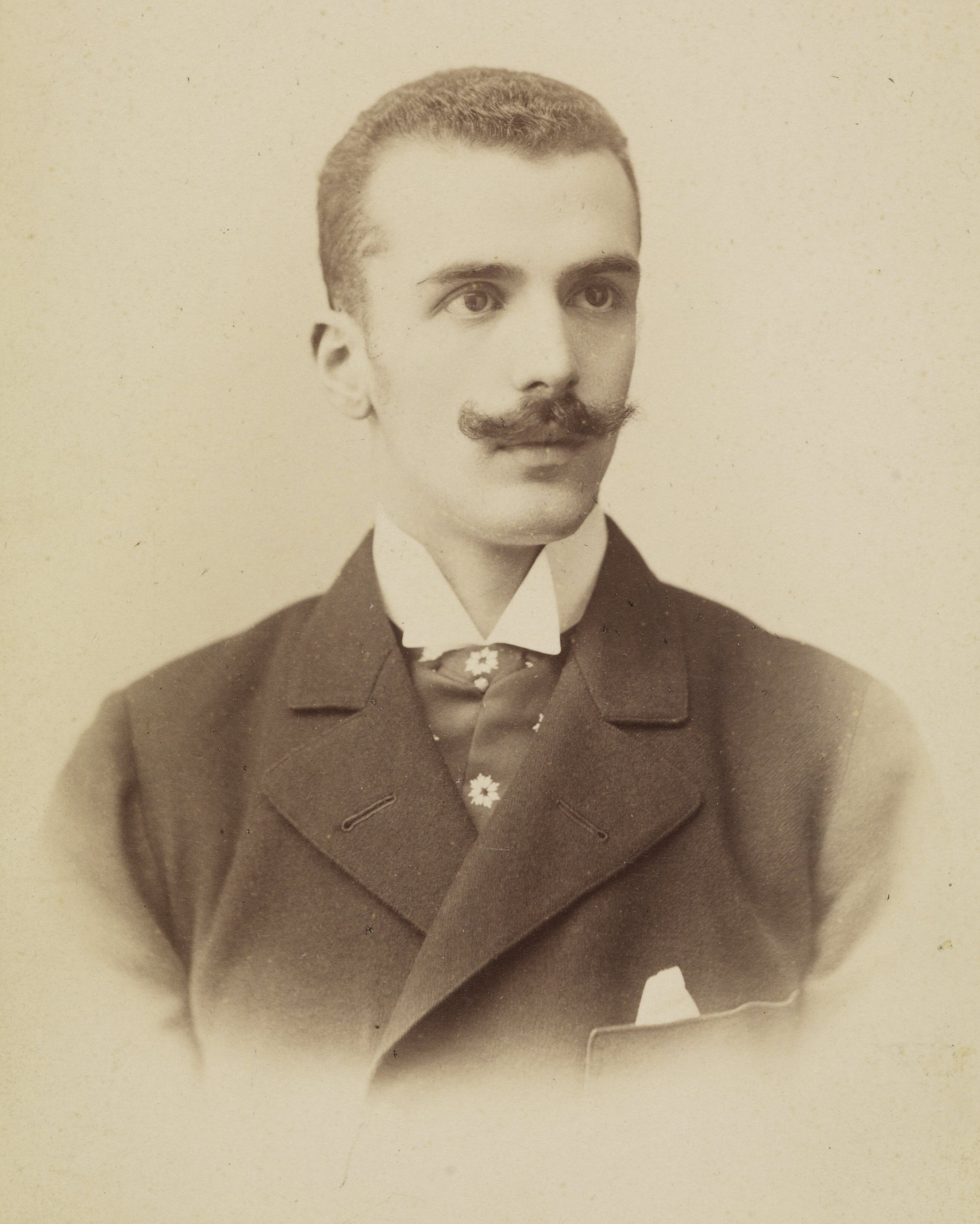 Józef Śliwiński,. ok. 1895 r.